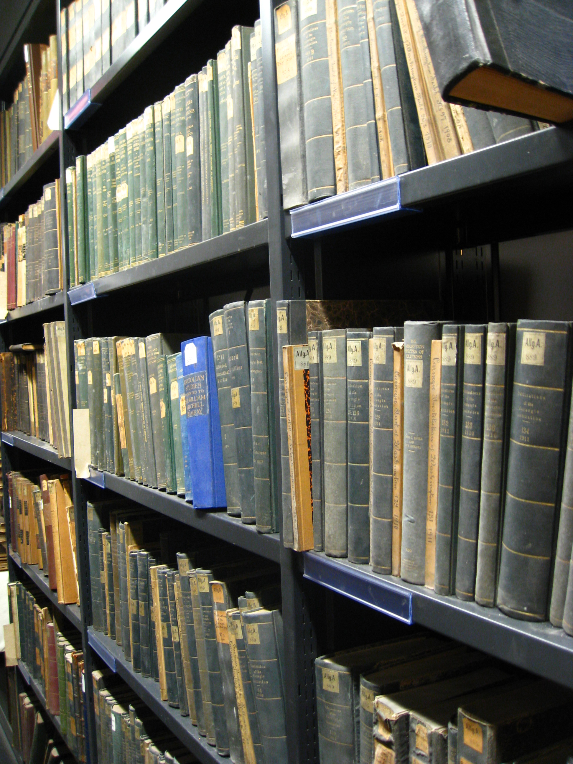 Freihandbestand in Grimm-Zentrum HU Berlin.